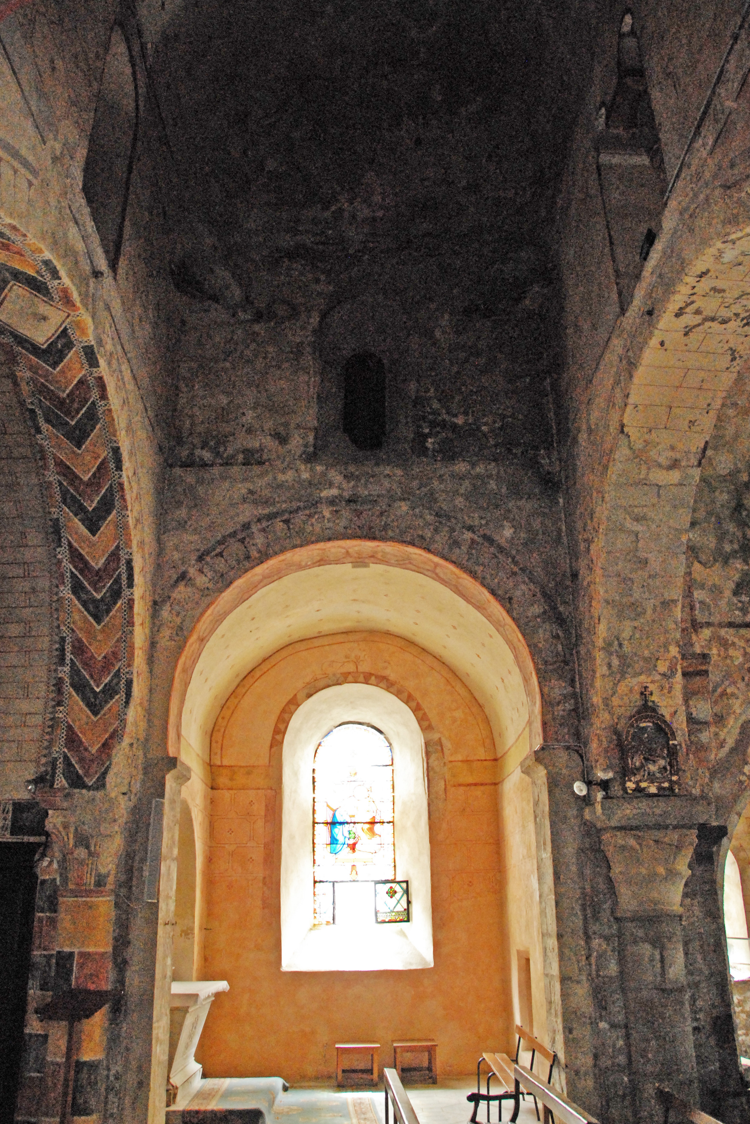 Dorfkirche Chambon-sur-Lac, Vierung u. südl. Querhausarm